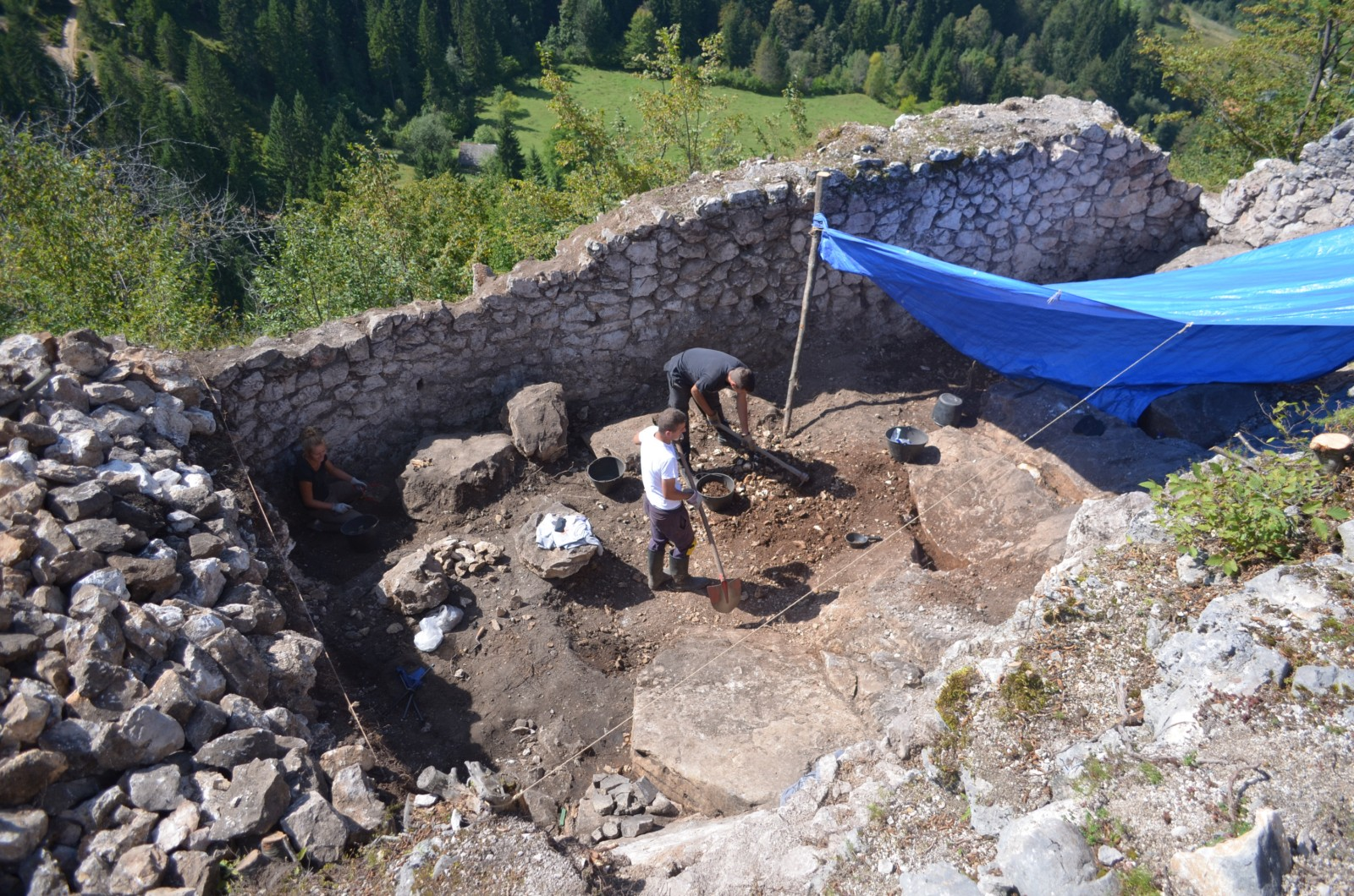 Археолошка истраживања на Градини у Горњим Палама